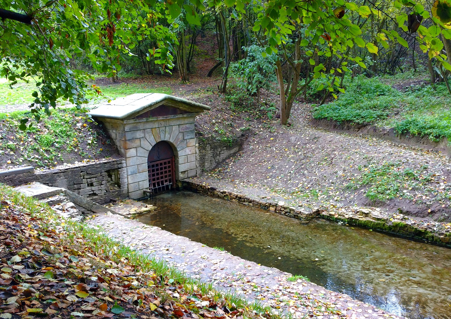 Portal wylotu Sztolni Głebokiej "Fryderyk"